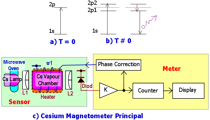 Nguyên lý hoạt động của máy đo từ lượng tử (Optically Pumped Magnetometer)